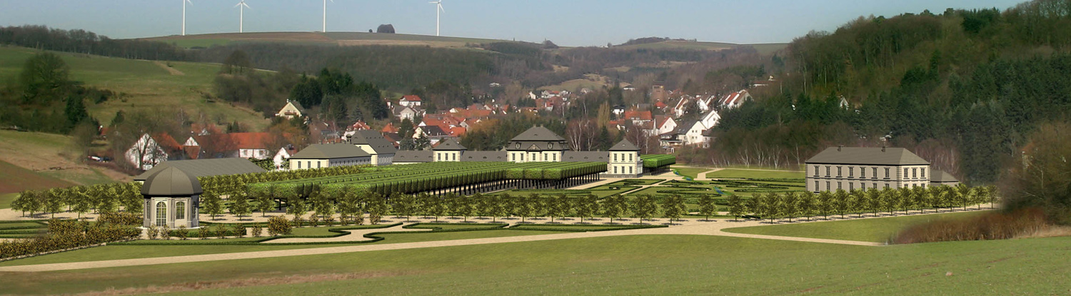 Montage des Jagdschlosses in den heutigen Ort